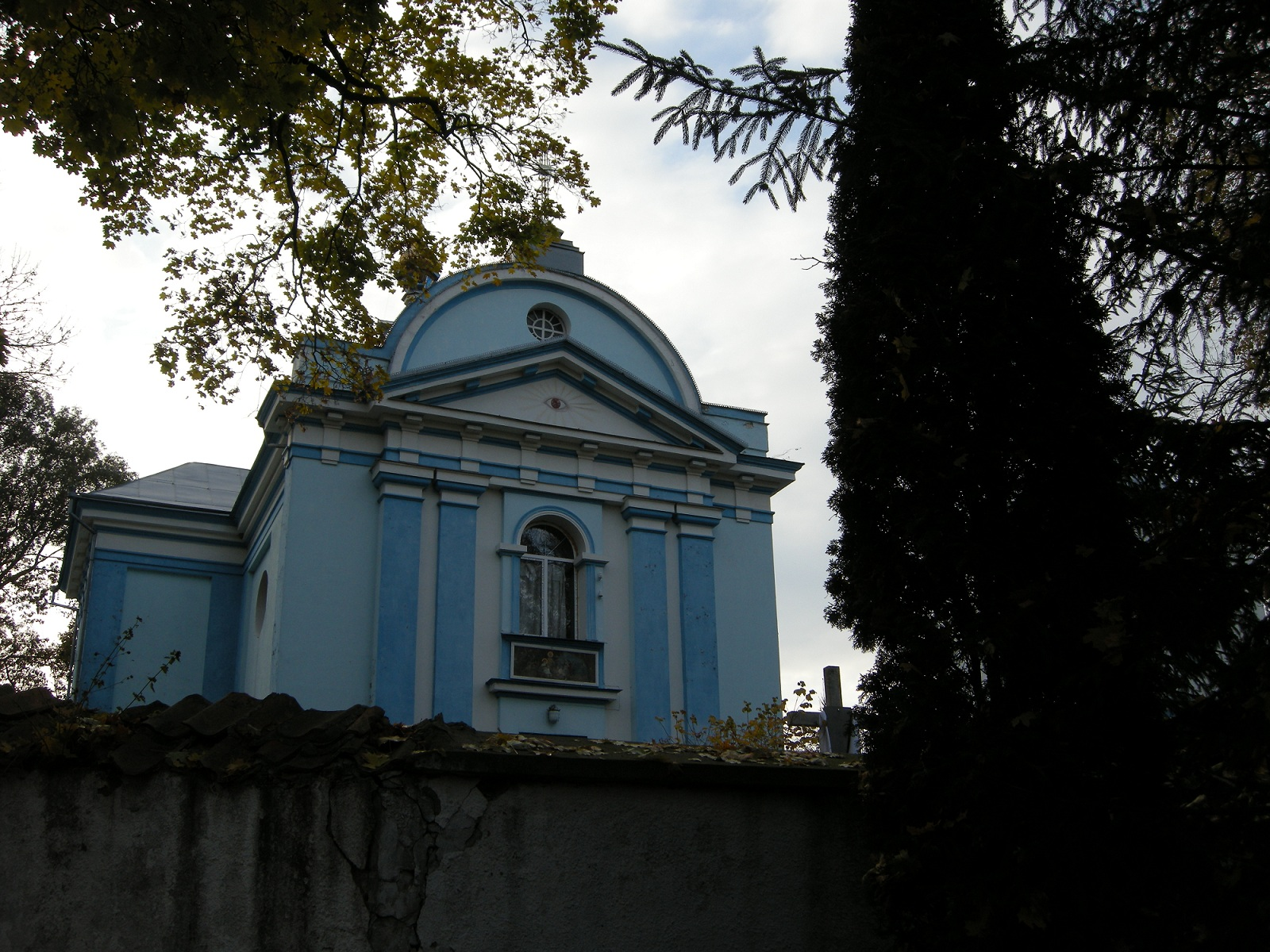 Церква Різдва Христового. Клевань. З 1777 року.